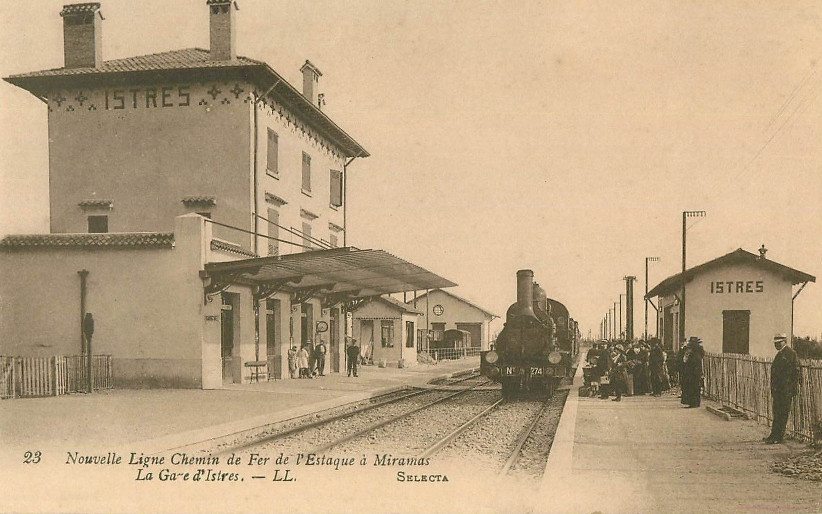 Carte postale de la Gare PLM d'Istres dans les années 1920